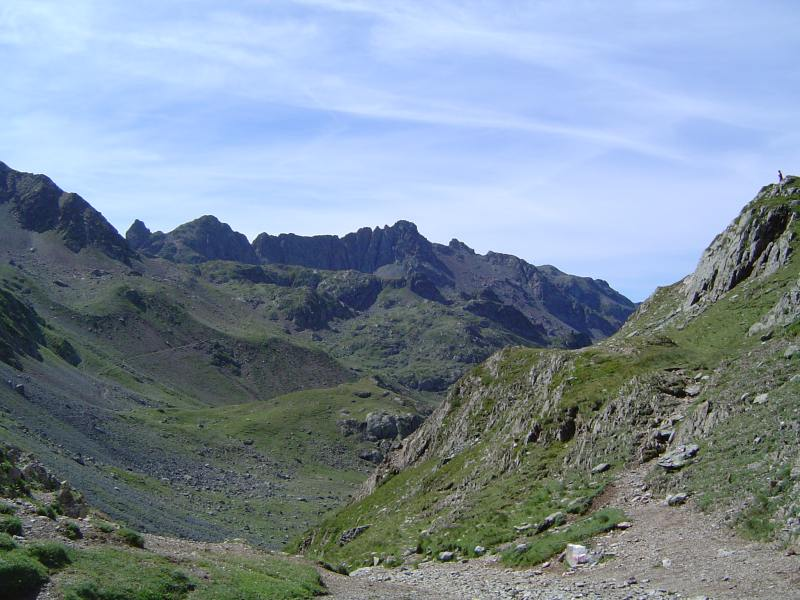 Vue prise du col de la Pra dans le massif de Belledonne 2005. Cevenol2